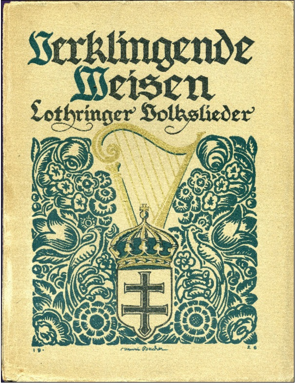 Louis Pinck: Verklingende Weisen, Bd. 1, Metz 1926, Illustration von Henri Bacher